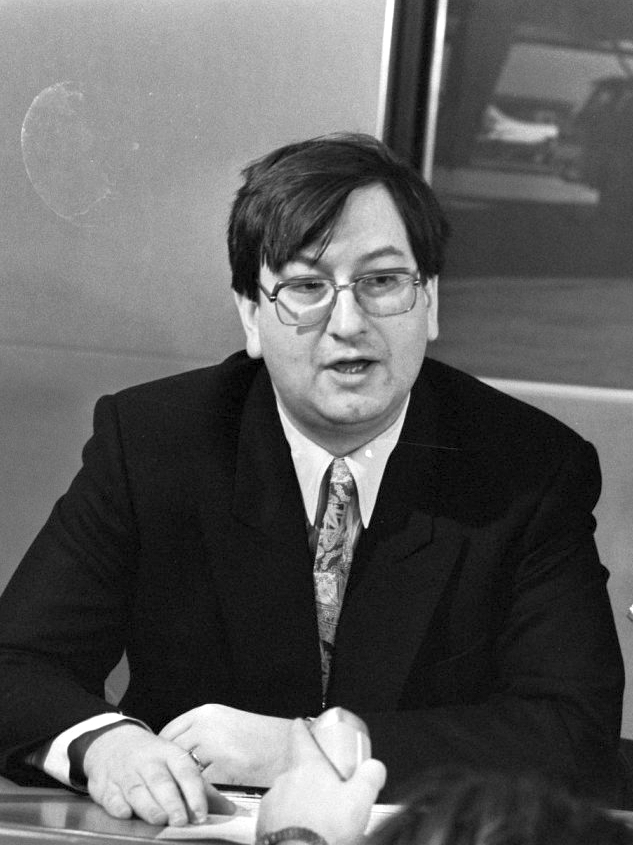 FIDE bestuurders, Raymond Keene (1985).